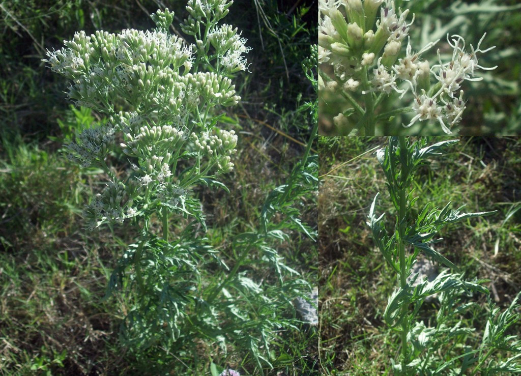 Mikania pinnatiloba. Asteraceae. Fotos tomadas sobre suelo húmedo en claro del bosque ribereño al margen del Río Negro en Palmar, departamento de Soriano, Uruguay.